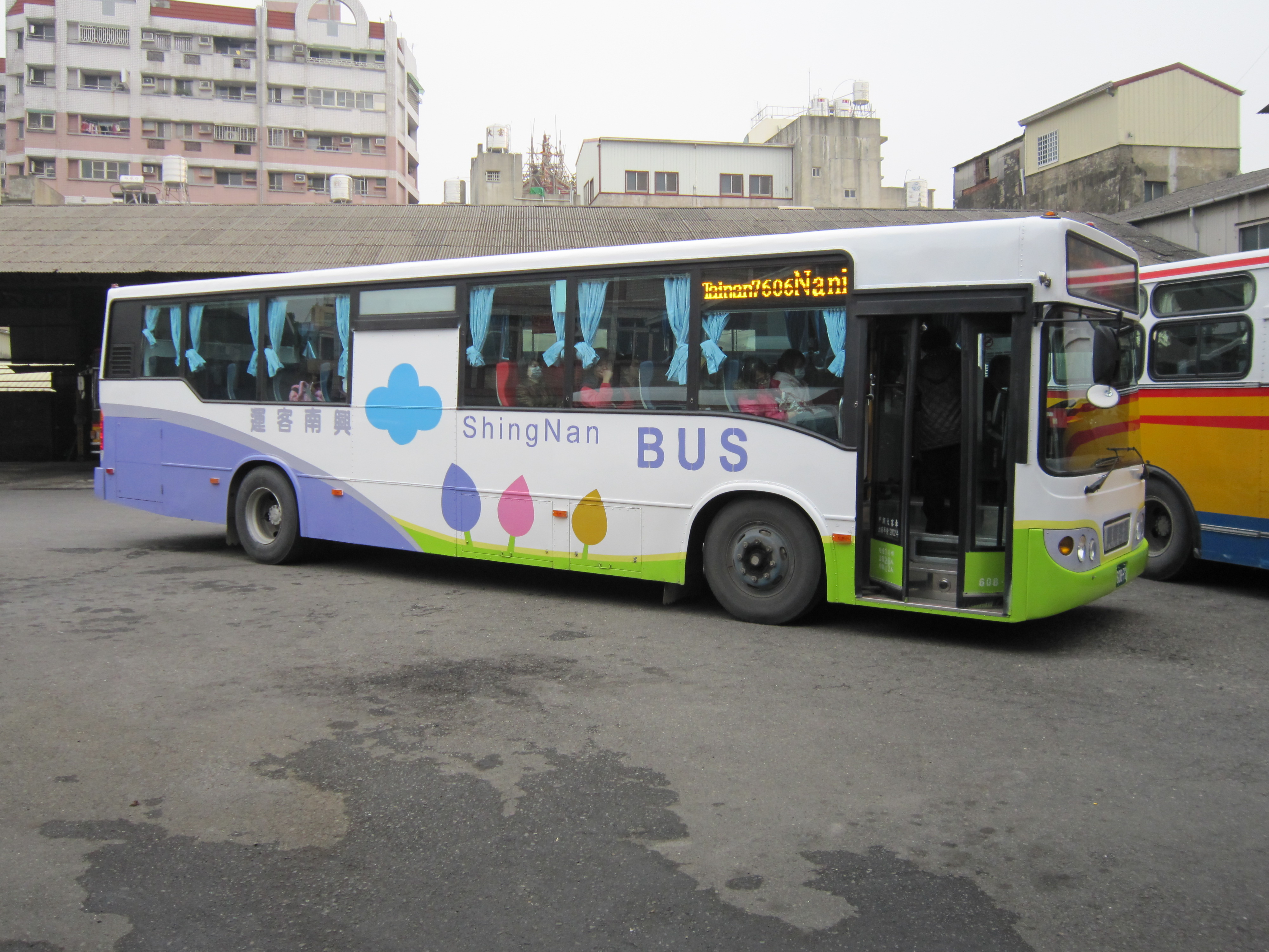 興南客運2002年原首都客運日野大窗車608-FS。